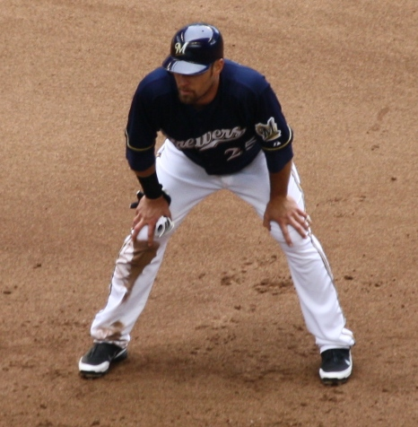 Mark Kotsay base running at Miller Park in 2011.